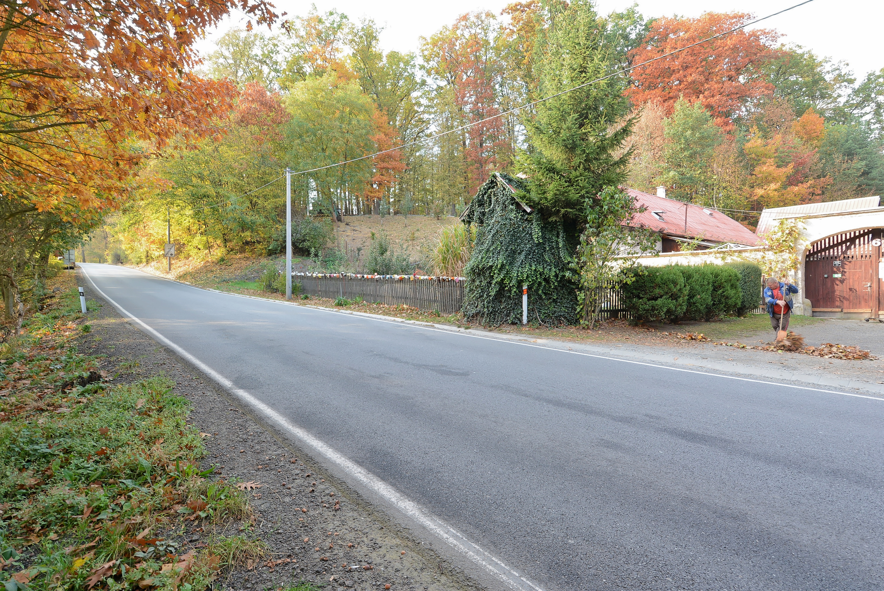 Torzo Žižkova dubu v Konopišti.